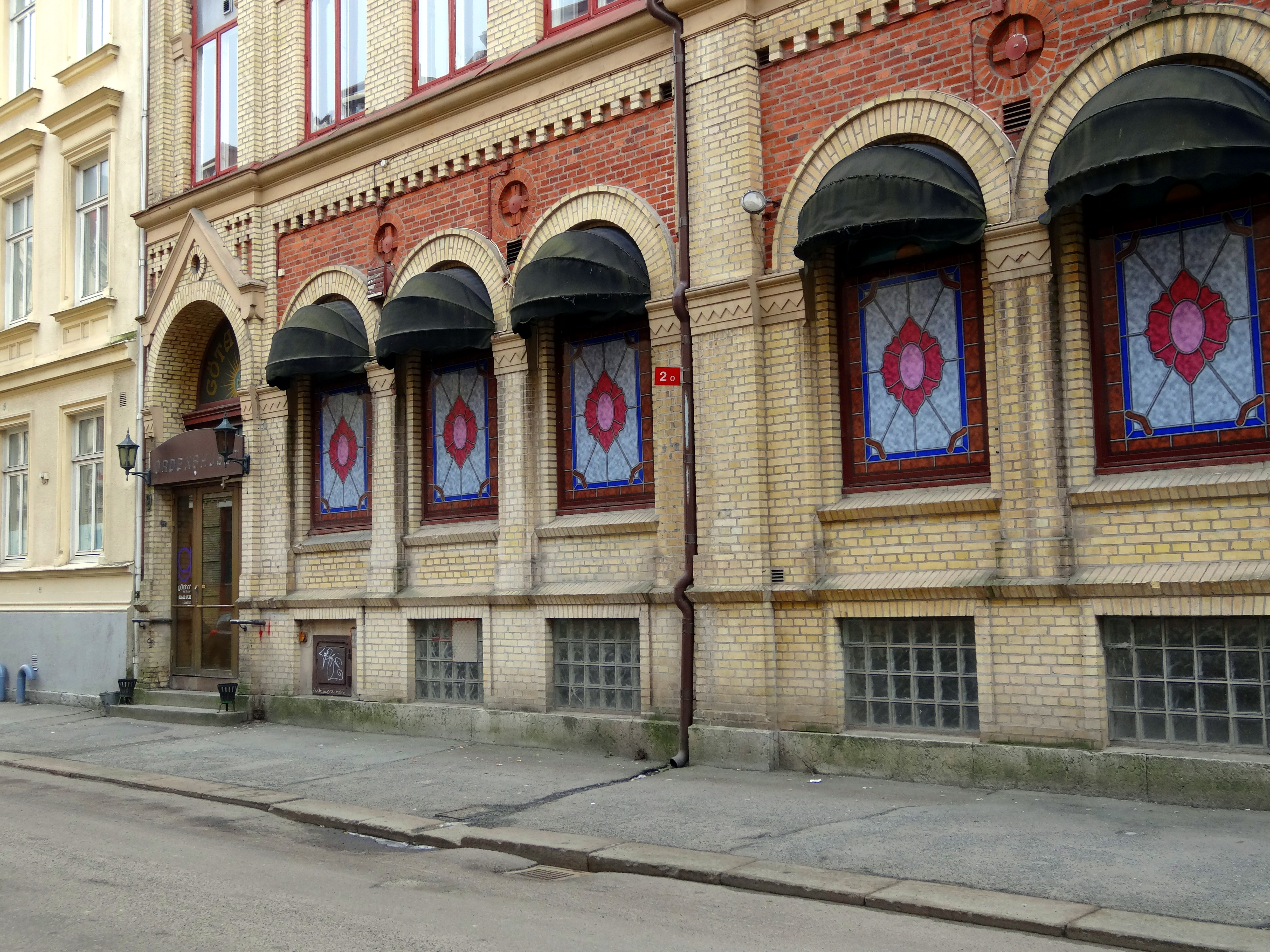 Bellmansgatan 9 i Göteborg. Ordenshus för logen Göta Coldin inom Coldinuorden.